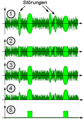 Signale an den Testpunkten des Blockschaltbildes im File:DickeFix2.gif für die Erklärung des Dicke-Fix-Prinzips